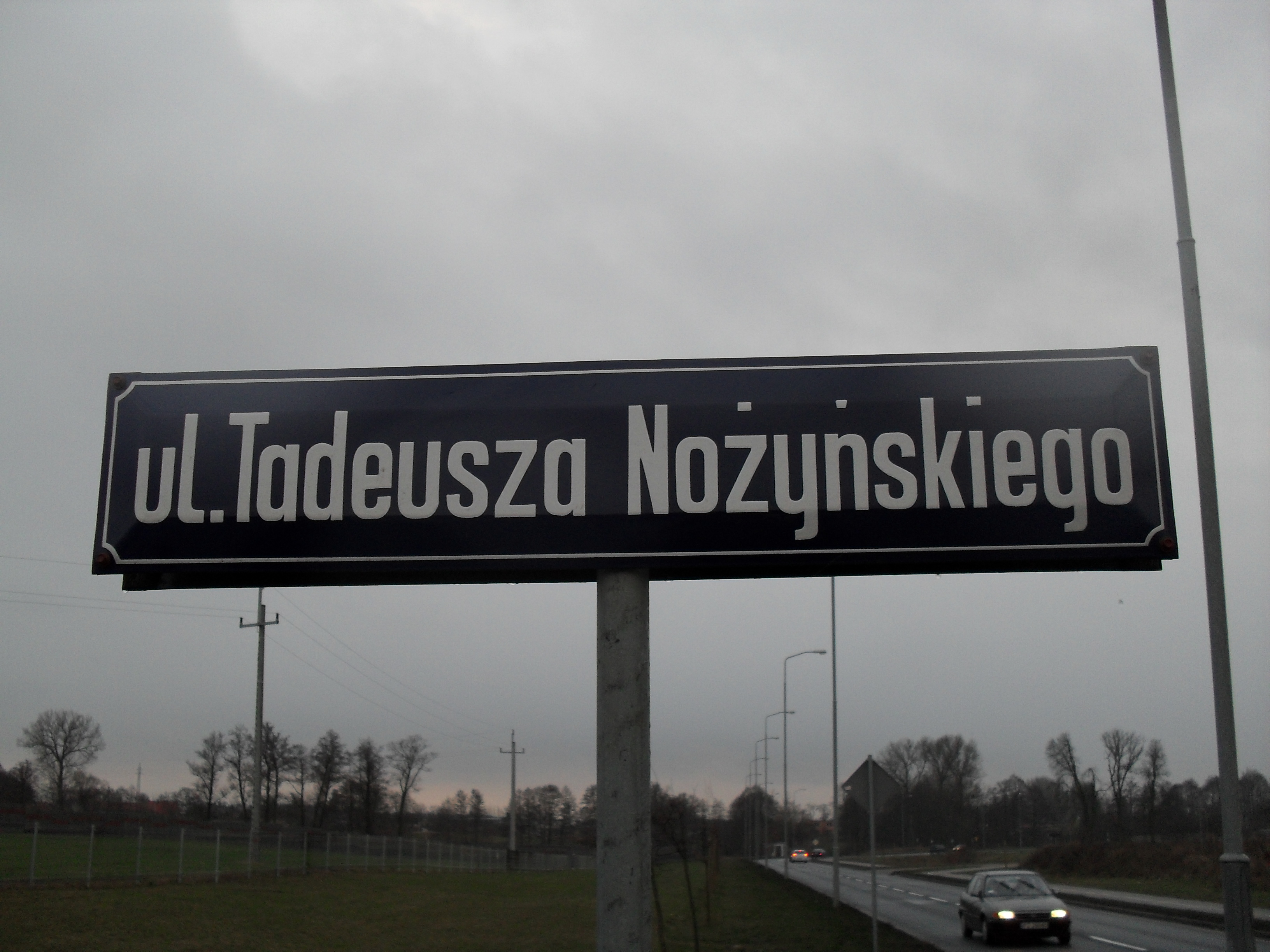 Ulica znajduje się w Wągrowcu.